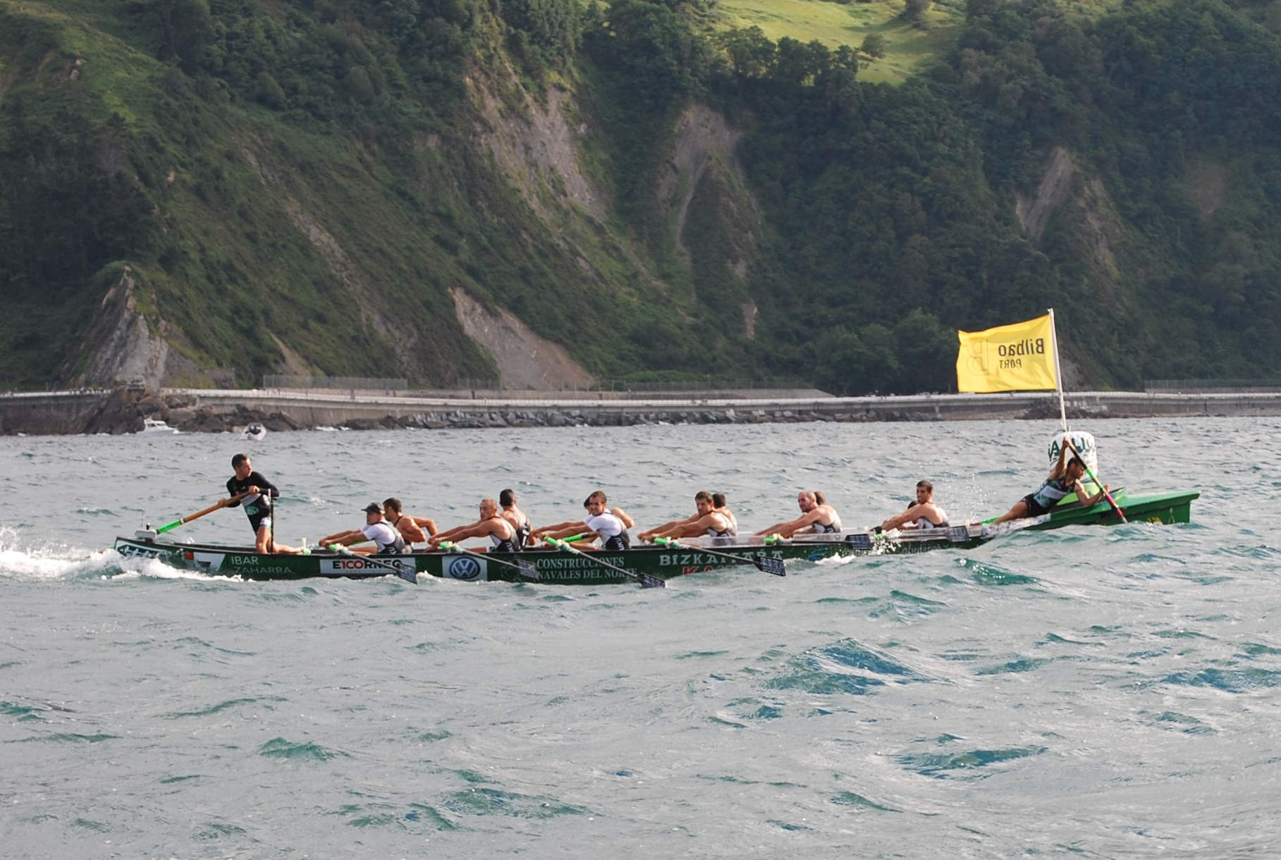 Virage autour de la bouée du large d'un trainière en compétition lors du Drapeau de Zarautz (2010)